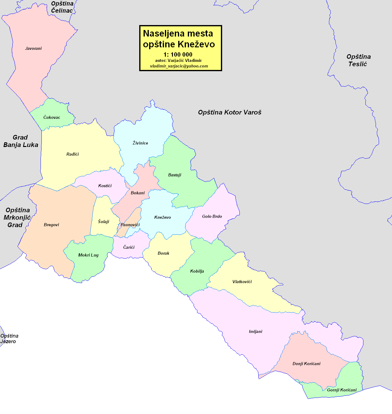 Opština Kneževo